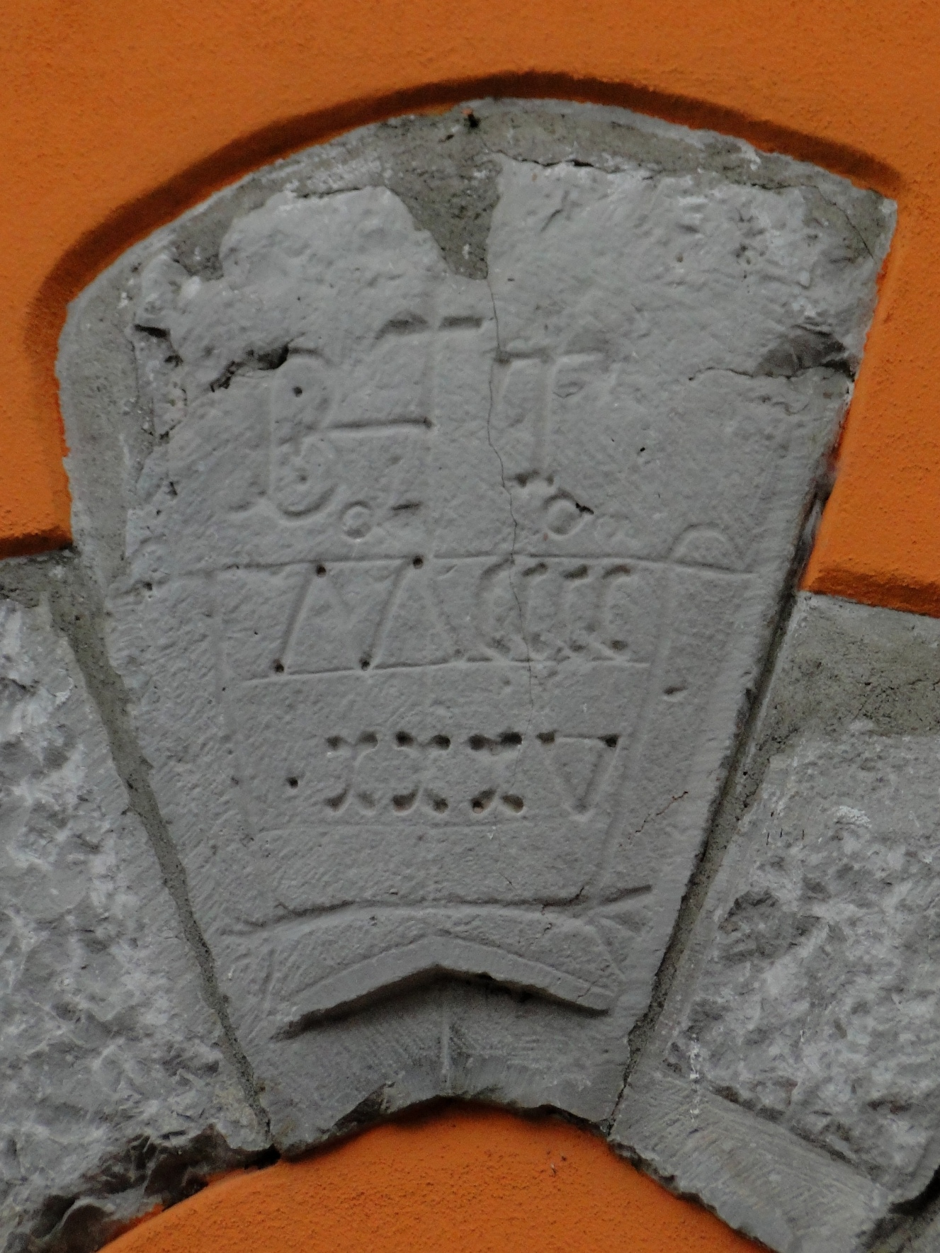 Albino (BG), via Carrara, Portone datato 1435